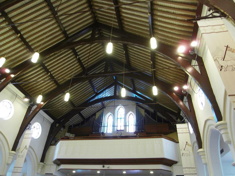 中文（香港）: 九龍玫瑰堂, 香港, 中國